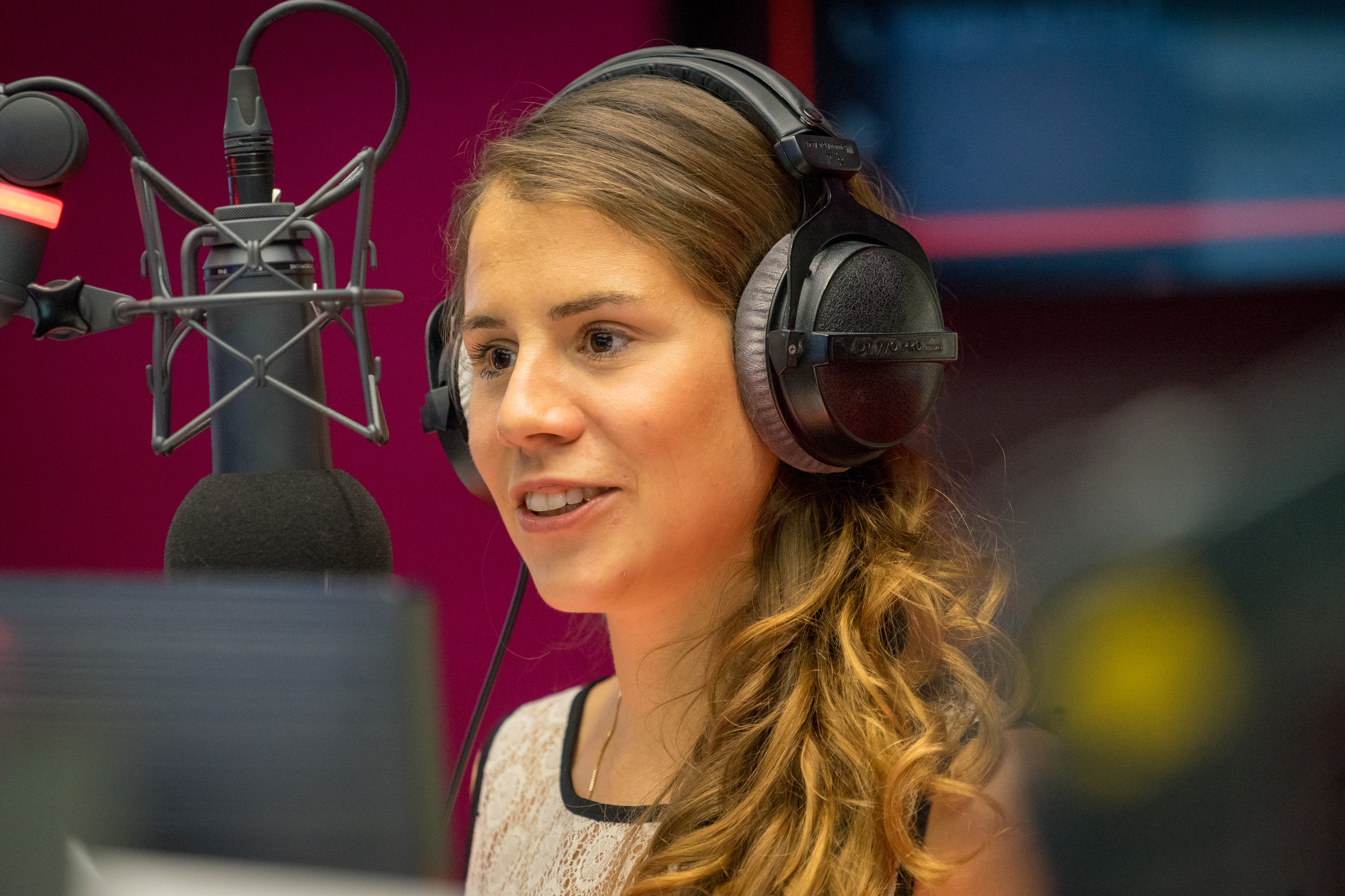 Sängerin Eliane im Interview bei Radio Pilatus